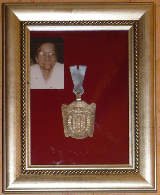 Foto de la medalla al merito a la sociedad Civil del Departamento de Cochabamba